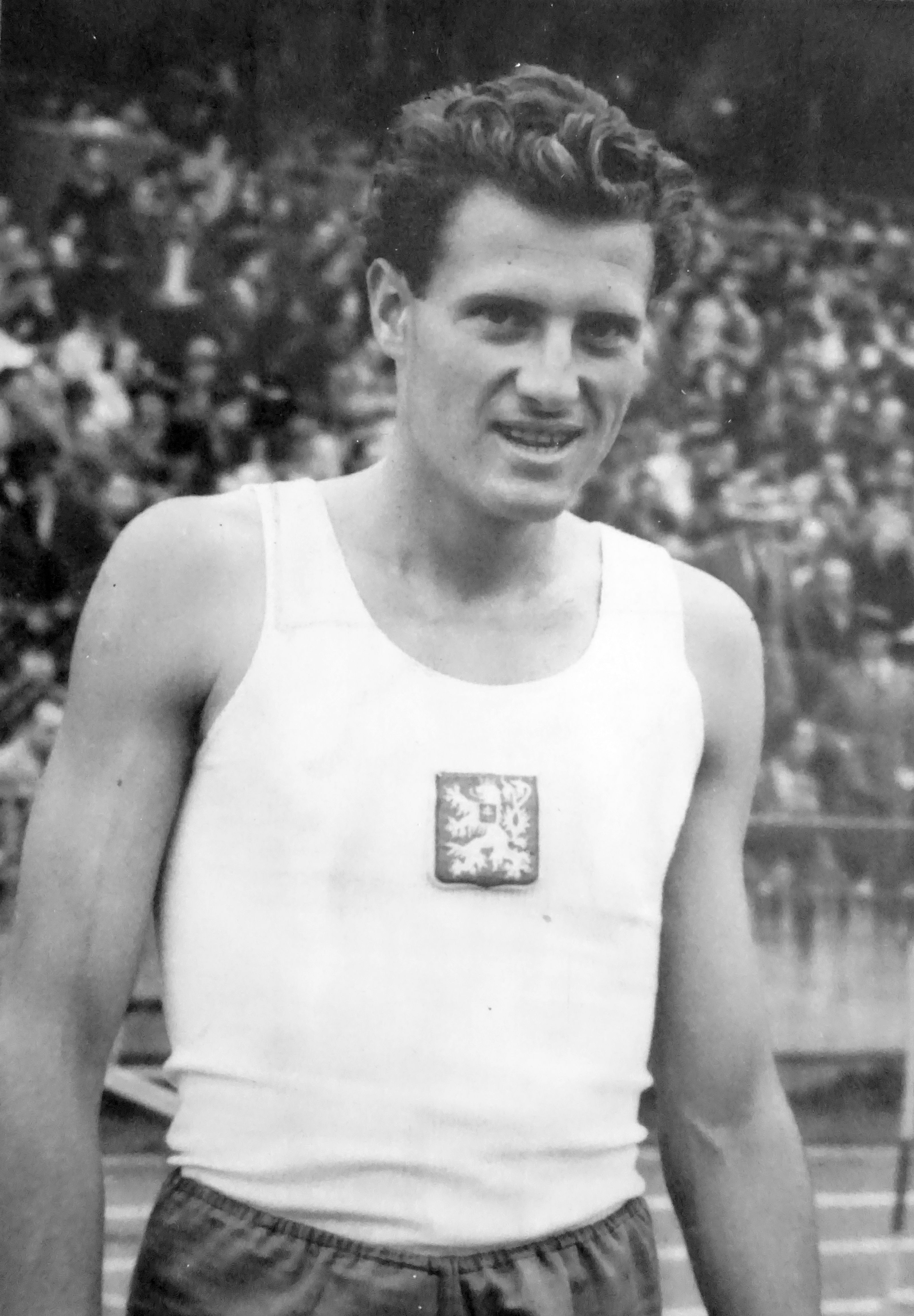 Milan Tošnar, reprezentant ČSR